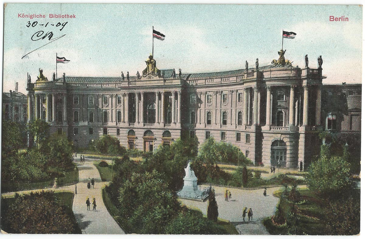 Vue de Berlin au début du XXe siècle (carte postale).